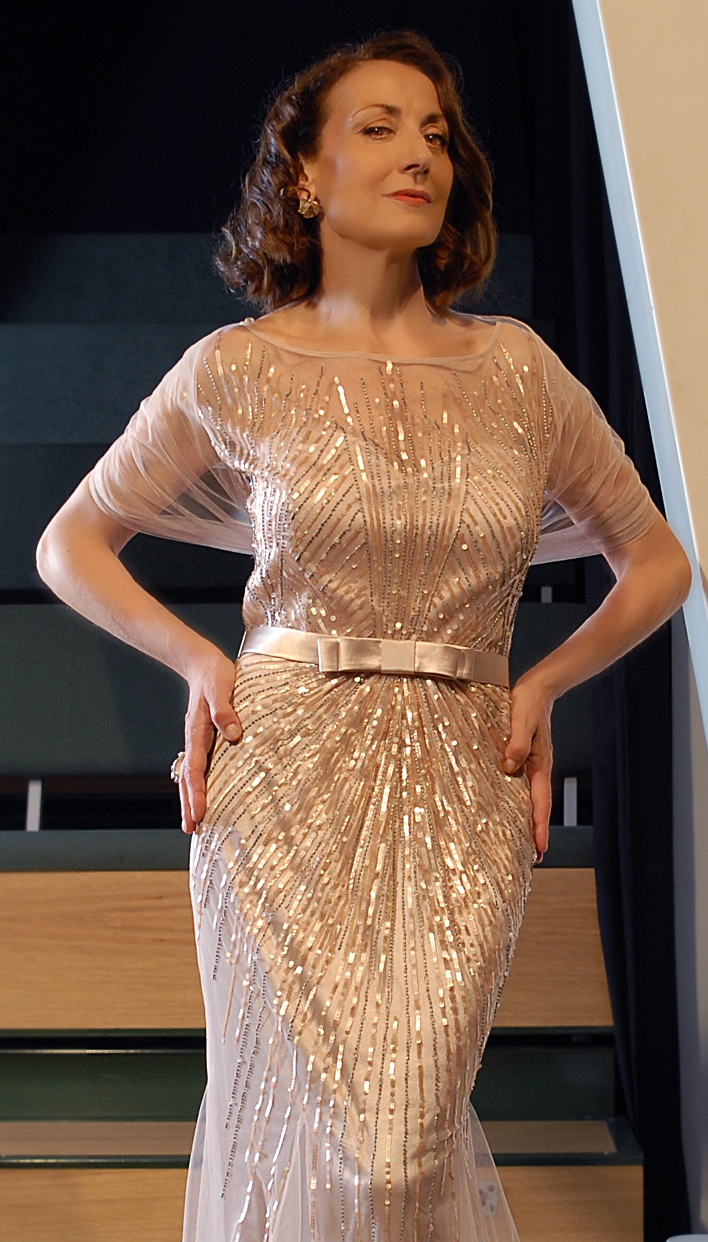 Carme Elias